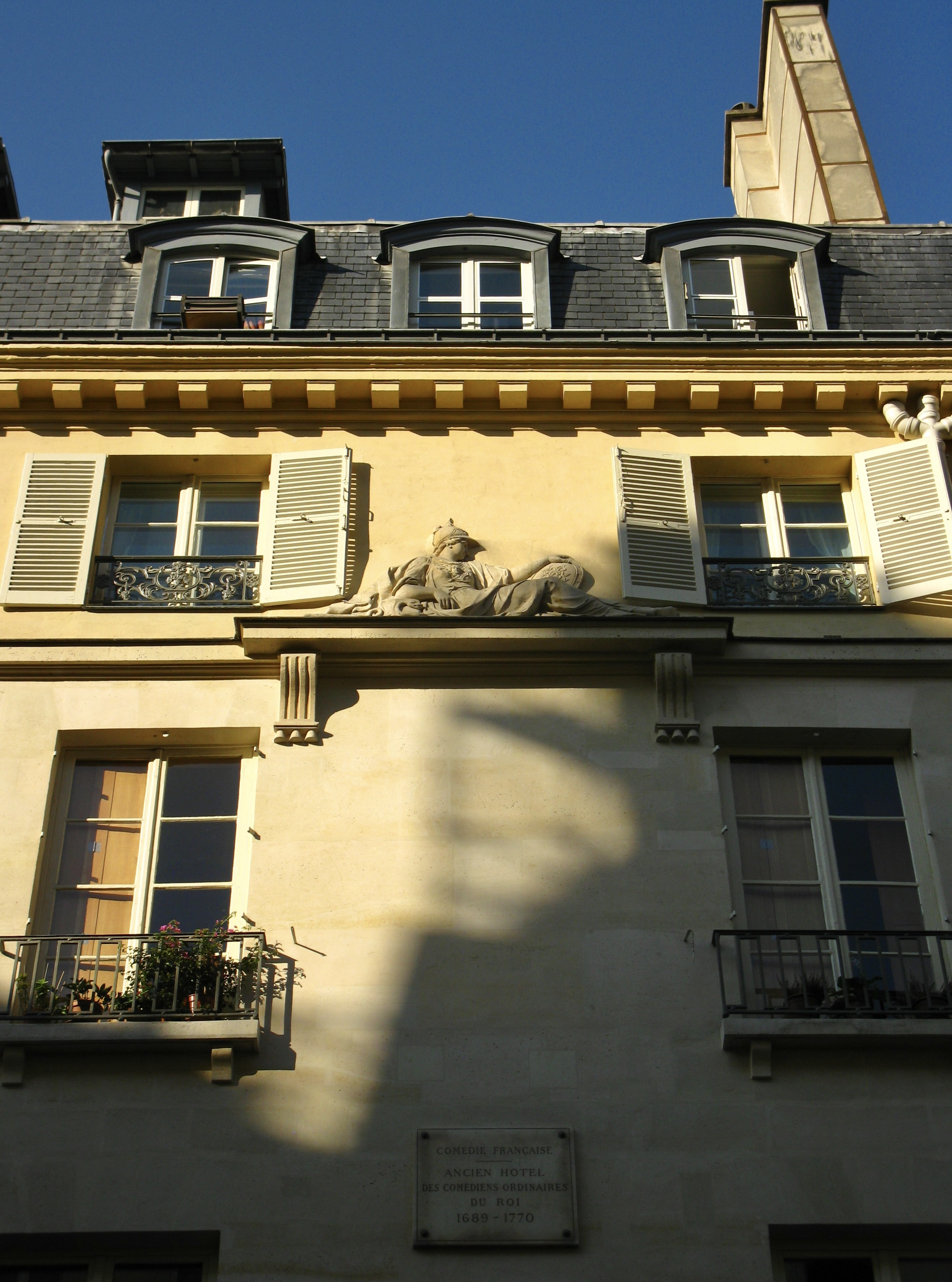 Façade de l'hôtel des Comédiens ordinaires du roi, 14 rue de l'Ancienne-Comédie, Paris .